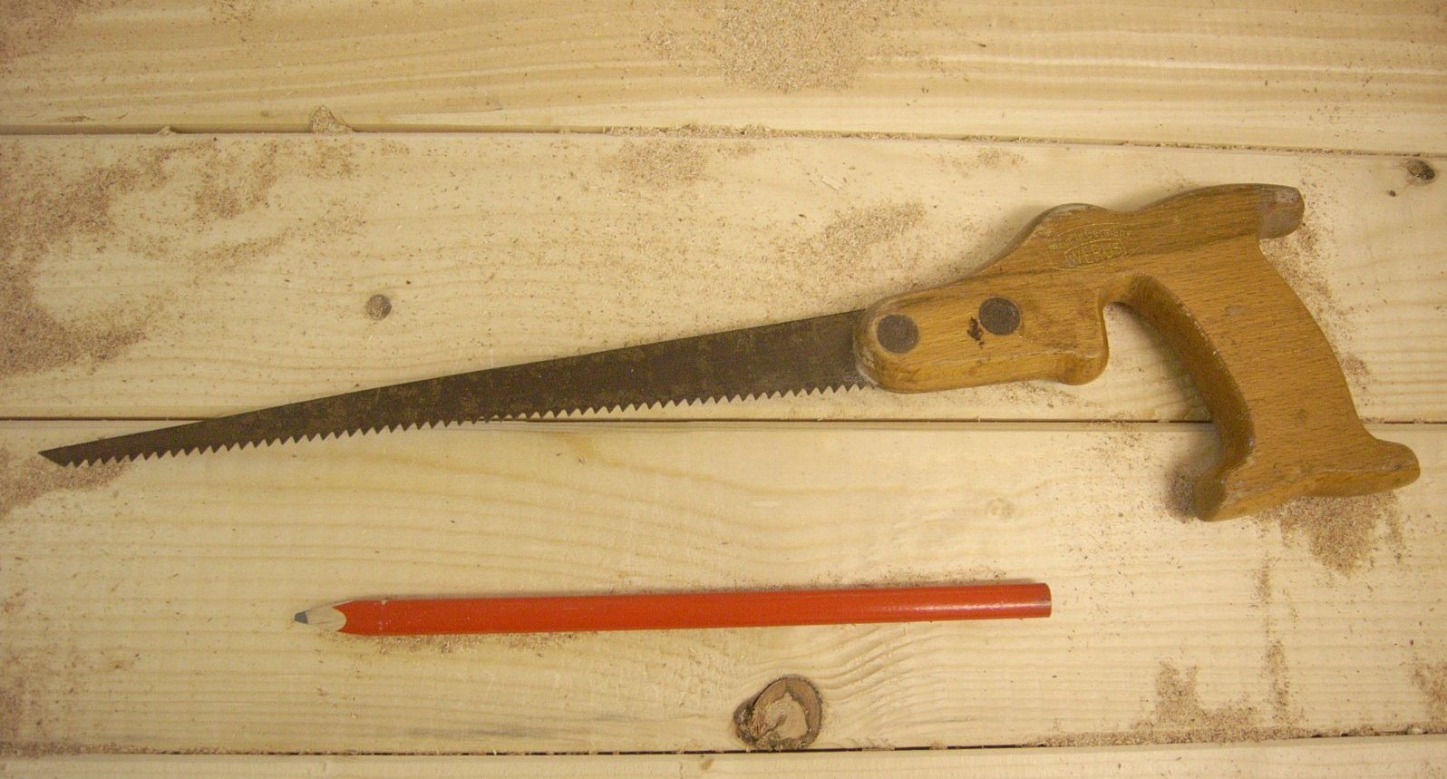 Stichsäge(Sägewerkzeug)